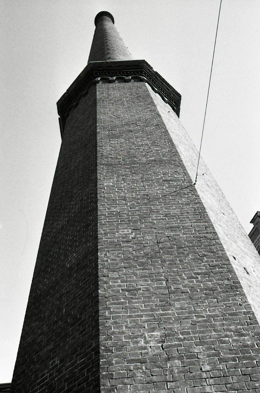 Servizio fotografico : Capriate San Gervasio, 1979 / Paolo Monti. - Strisce: 7, Fotogrammi complessivi: 35 : Negativo b/n, gelatina bromuro d'argento/ pellicola ; 35 mm. - ((Sul portanegativi: N[I]K[MA]T FP4 e iscrizione tipografica commerciale: "KINO - CINE - FOTO - OTTICA/ Corso Sempione 3/ 20145 Milano/ Telefoni/ 347769 - 381662 [cancellato a pennarello nero]; stampa tipografica a inchiostro rosso "K". Iscrizione documentaria manoscritta a penna nera: "1° viaggio". - Occasione: Pubblicazione (Einaudi, 1981) [1° viaggio]. - Fonte: Agenda di Paolo Monti: Nikon Leika 3001-/ Monti 1978 (1978-1982), presso Archivio Paolo Monti. - Fonte: Monografia: Villaggi operai in Italia: la Val Padana e Crespi d'Adda, Torino, Einaudi (1981). - Fonte: Fattura di Paolo Monti: IV. Commesse/ Fattura n. 09/ Riprese fotografiche per volume Villaggi operai (1981/03/10), presso Archivio Paolo Monti. N. 39 fotografie formato 24x30 scelte da oltre 100 eseguite a Crespi d'Adda in due viaggi successivi. N. 15 fotografie come sopra per il Professor Amerigo Restucci di Venezia